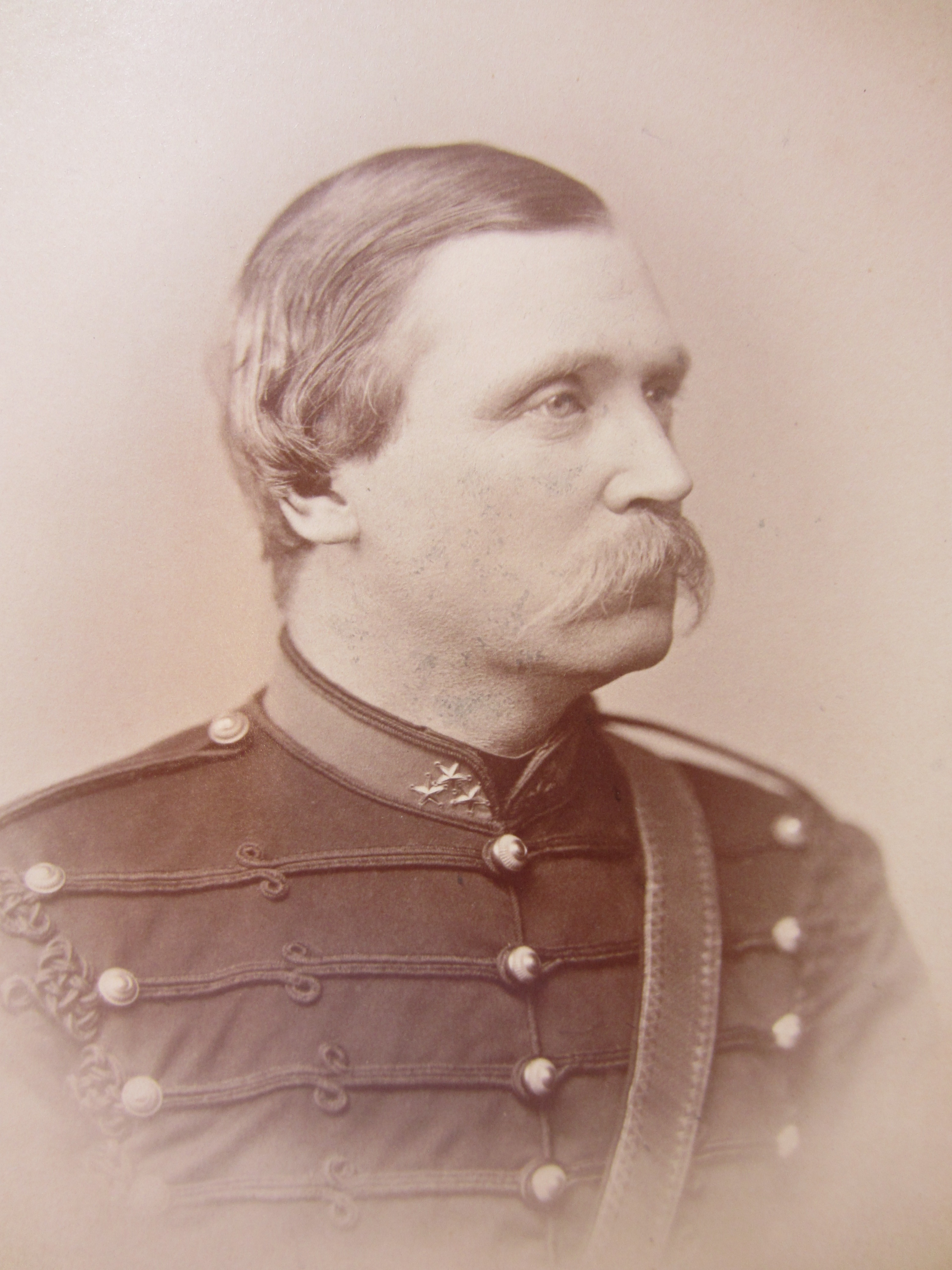 Carl Johan Abenius (1838-1910), Hjalmar Söderbergs första svärfar, Tom Söderbergs fotoarkiv 1:56 (2:26), Göteborgs universitetsbibliotek.